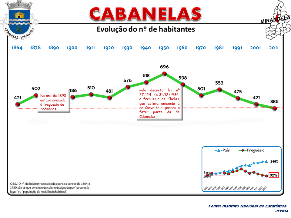 Evolução da População 1864 / 2011